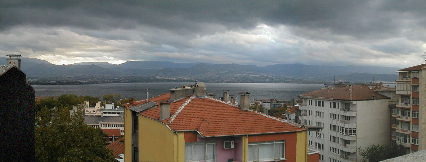 izmit merkezi"nden Samanlı Dağları ve izmit Körfezi'nin görünüşü